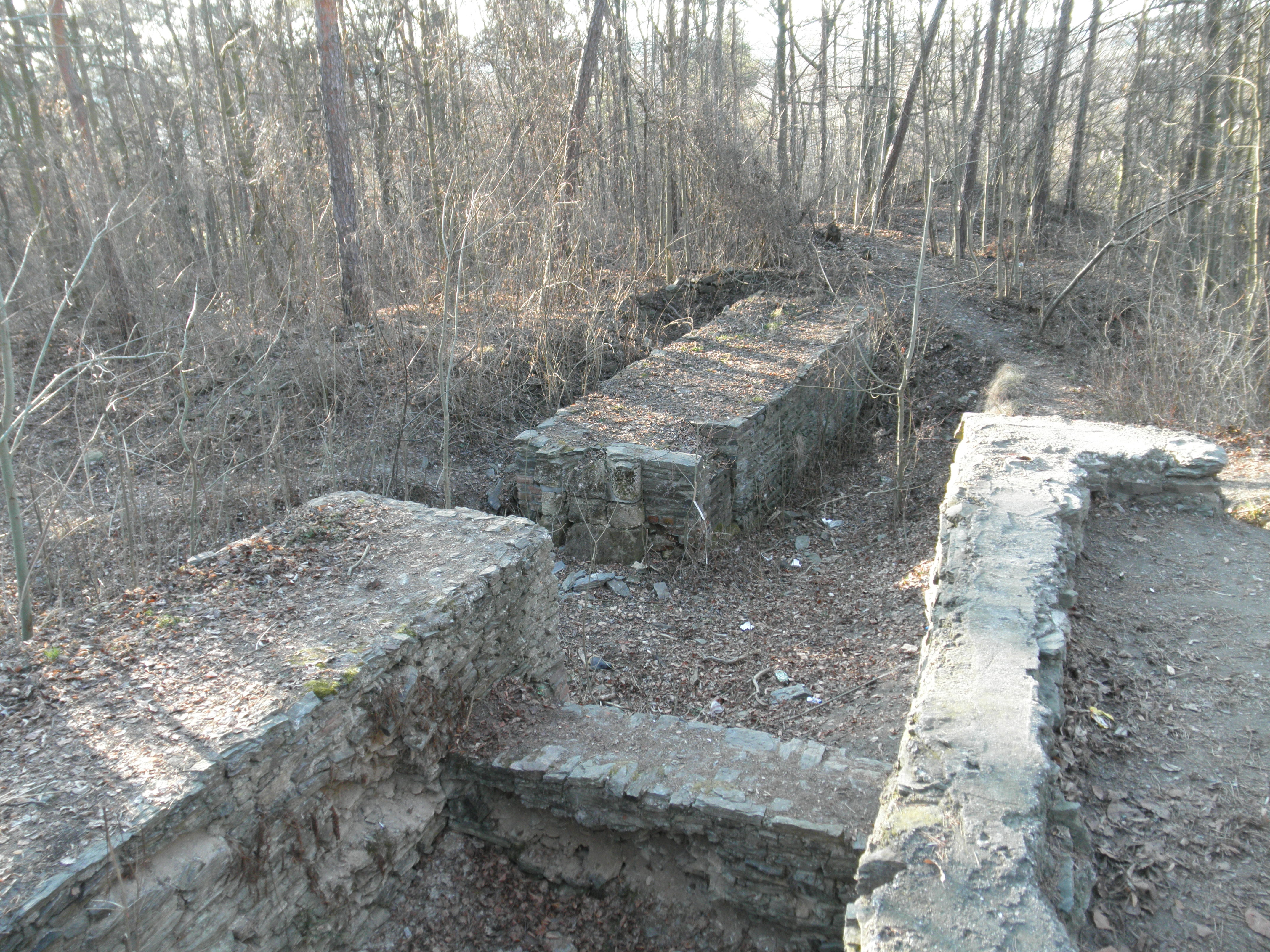 Hrad, zřícenina a archeologické stopy (Náměšť na Hané), na pokraji zámeckého vrchu, Náměšť na Hané. Viditelné jsou: původní brána, hlavní hranolová věž a dělicí hradba se zachovalými základy brány.